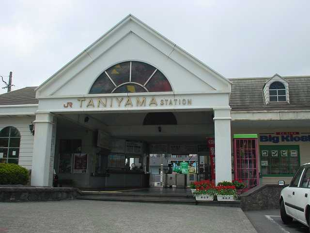 谷山駅の外観